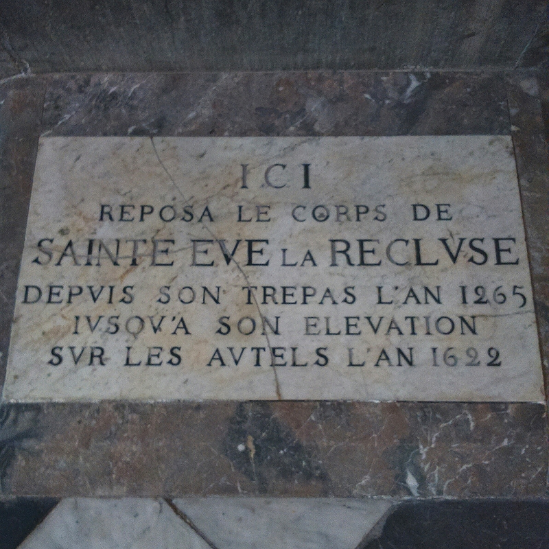 Emplacement du tombeau de sainte Eve de saint Martin avant que ses reliques soient déposées sur l'autel. Basilique saint Martin Liège,Belgique. Photo Philcotof juillet 2016.